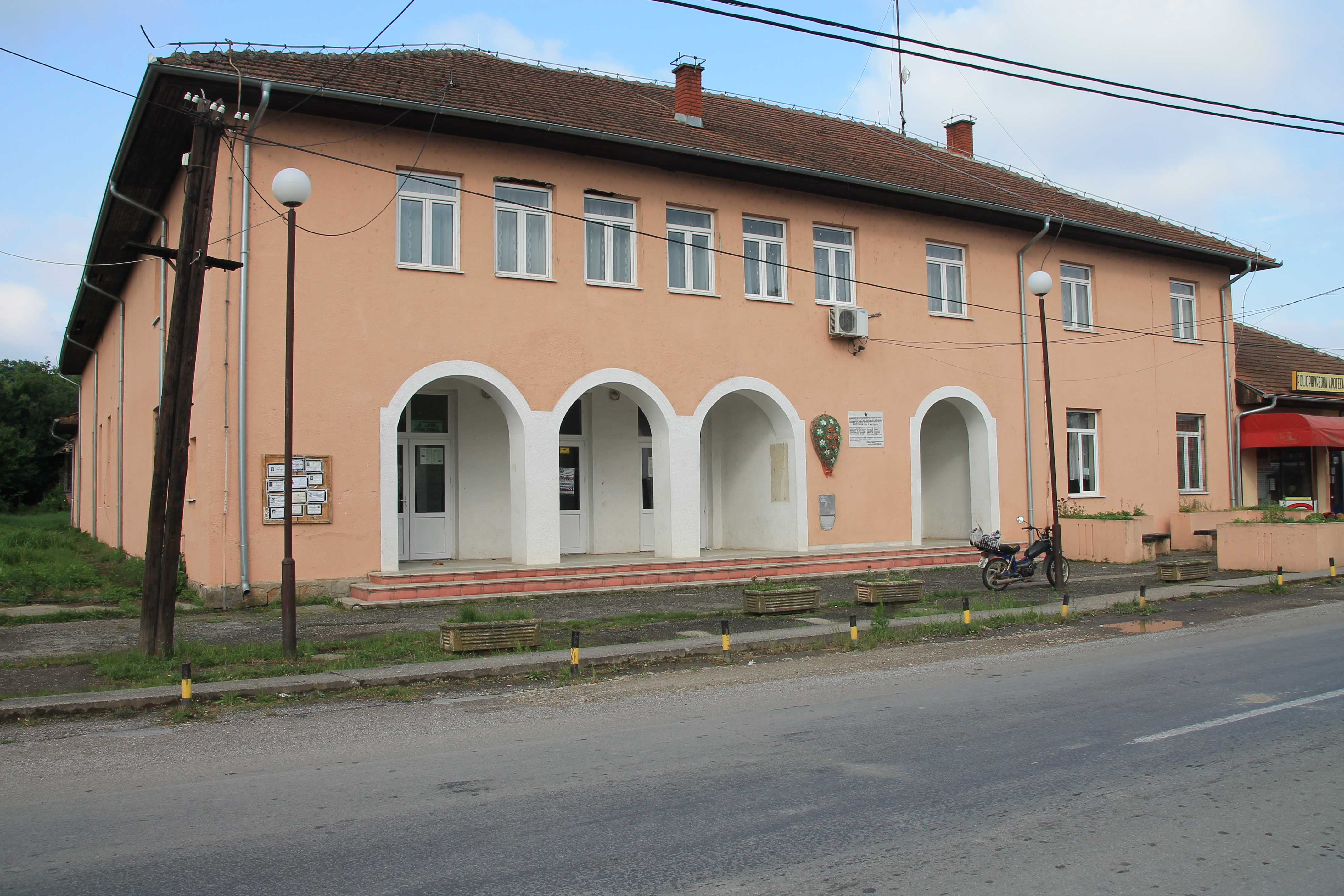 Dom kulture u Junkovcu